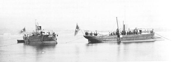 Cañoneros de la Clase Somorrostro